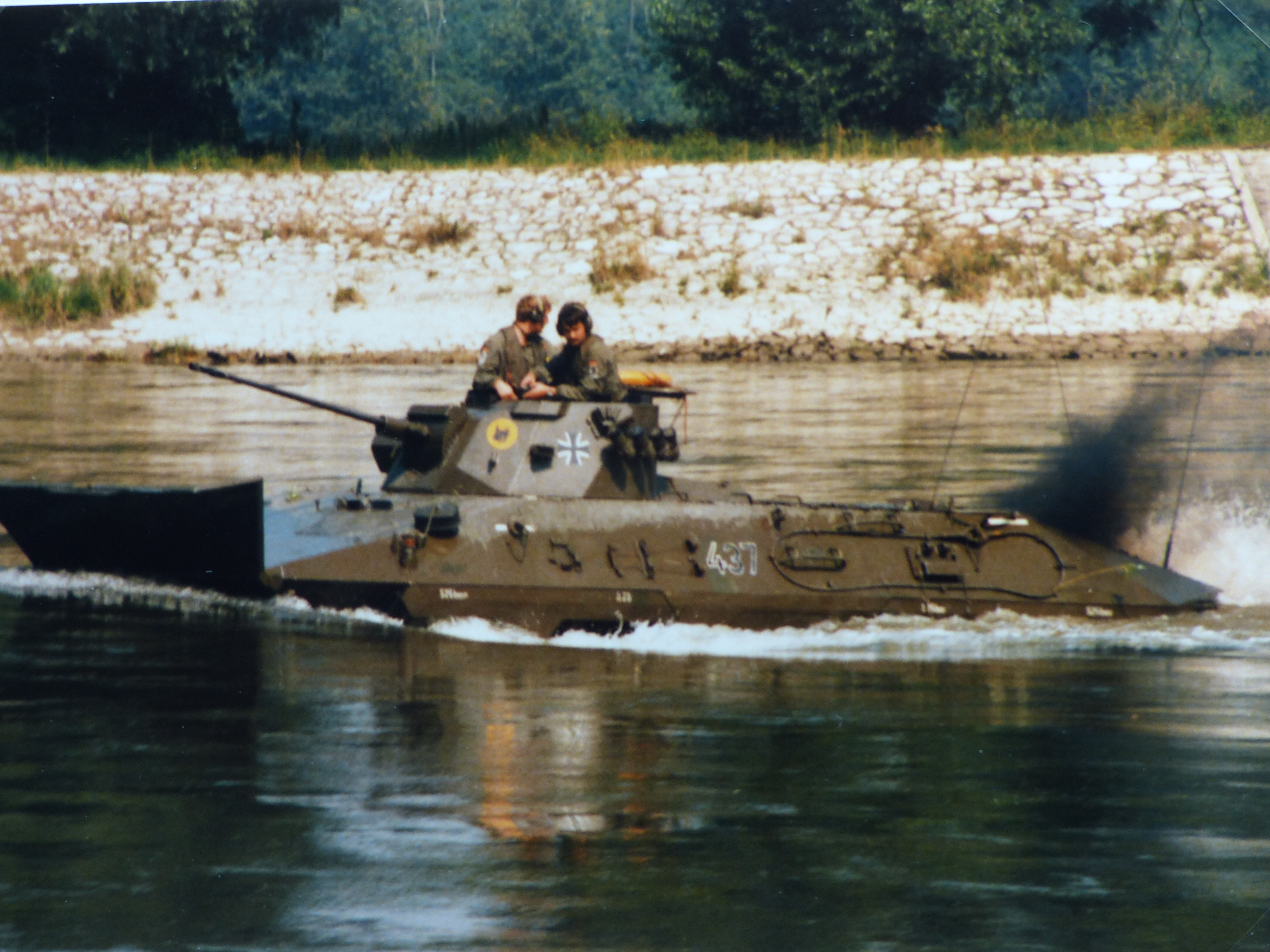 1986-07-18 amphibisches Schwimmen mit Luchs